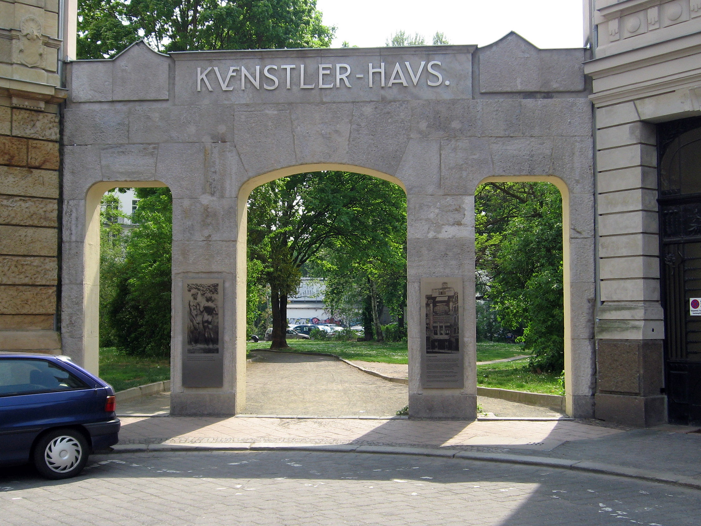 Leipzig, Nikischplatz, Portal des zerstörten Künstlerhauses, 2013 saniert und mit dem historischen Schriftzug versehen)